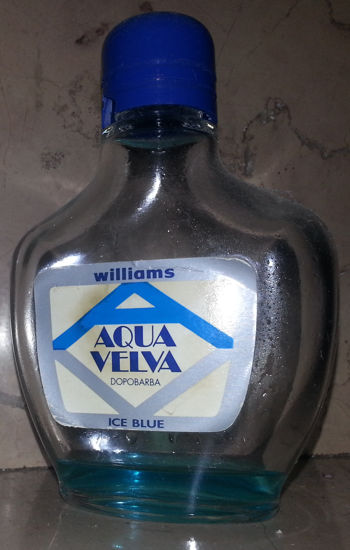 100ml bottle glass aqua velva